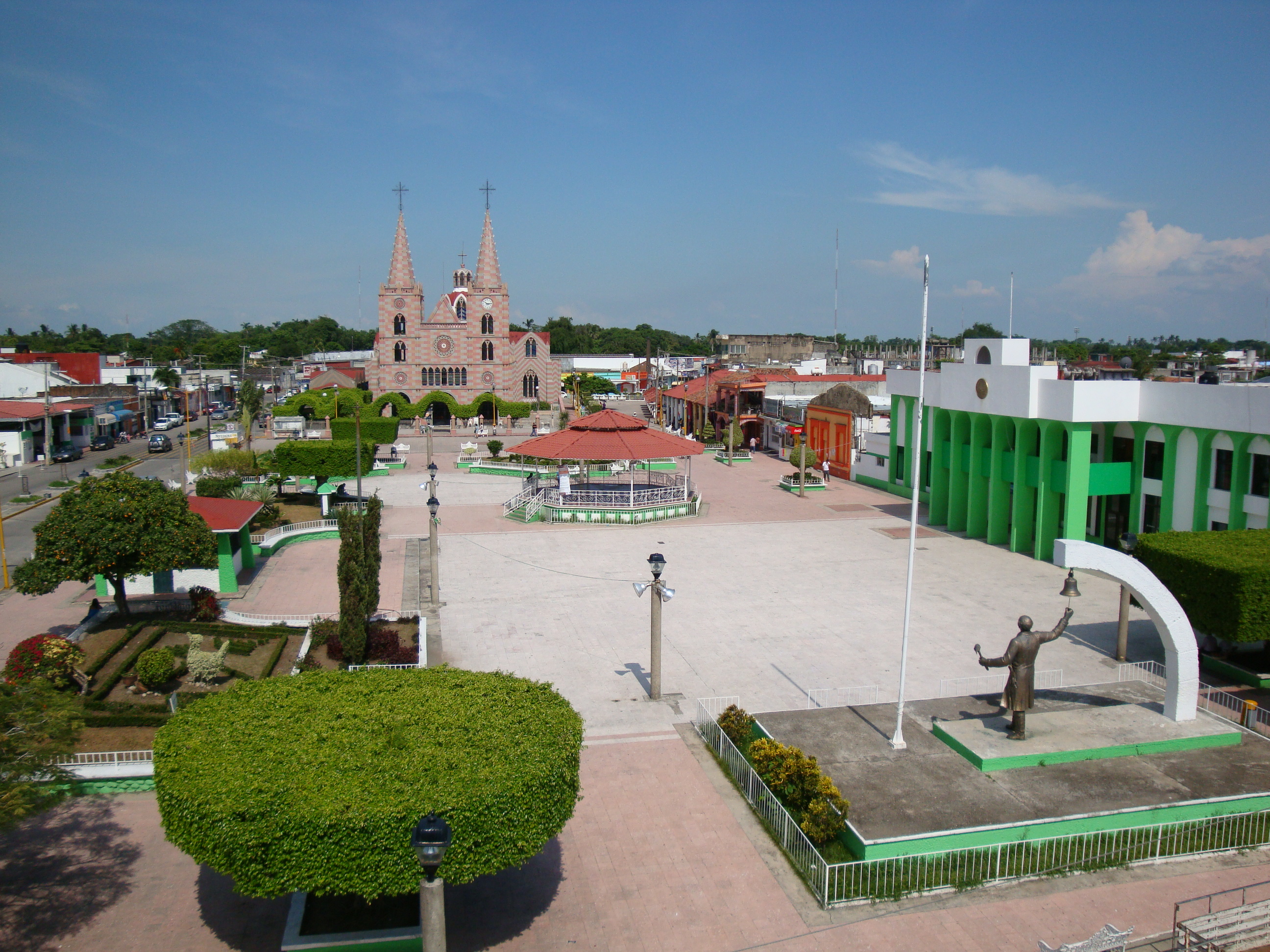 Parque principal de la ciudad de Nacajuca, estado de Tabasco, México.